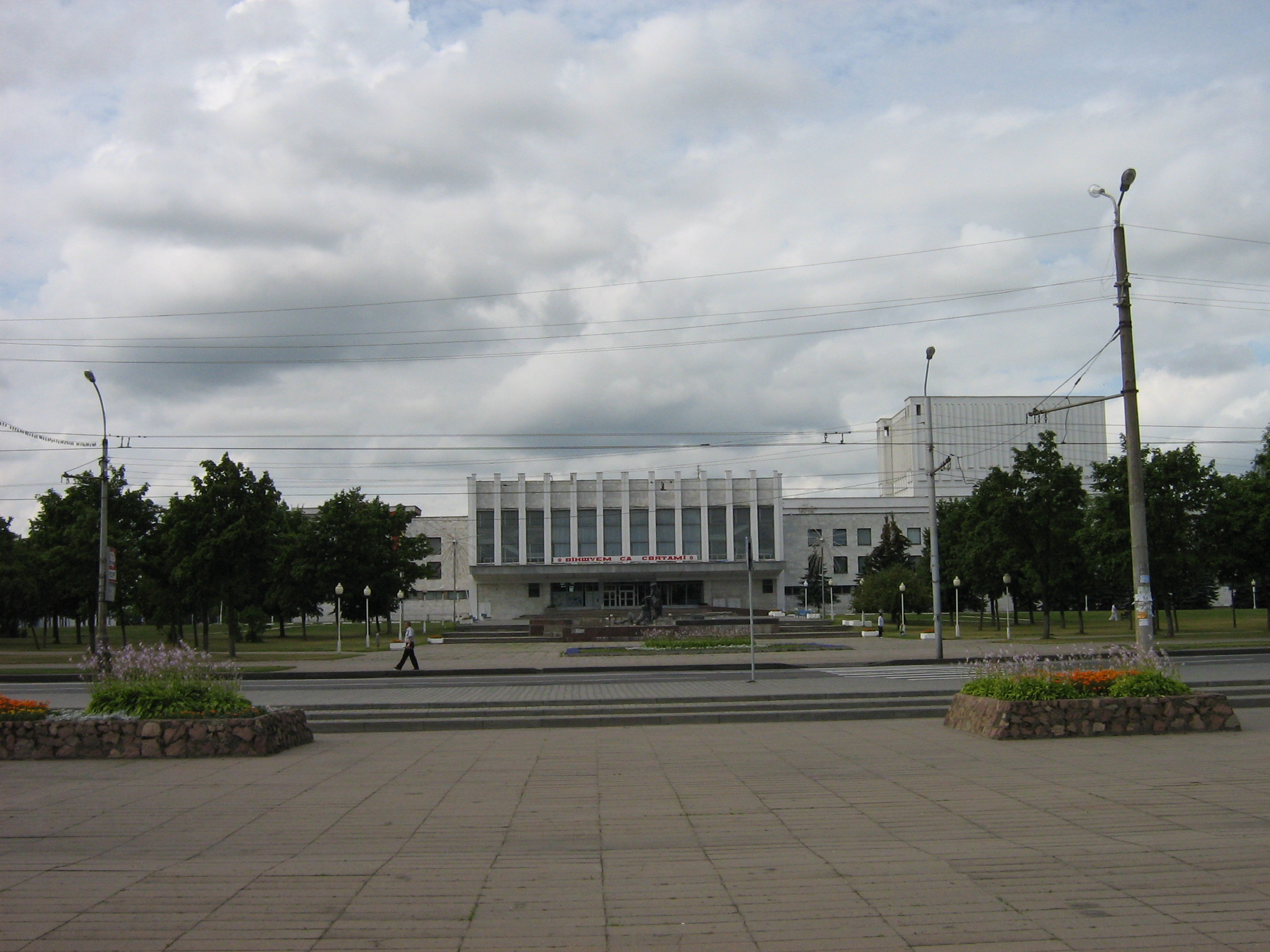 Могилев. Дворец "Химволокно".